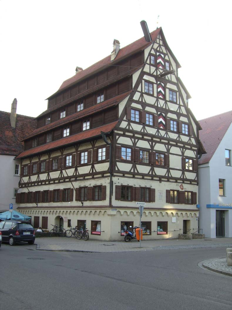 Das Siebendächerhaus in Memmingen von der Seite